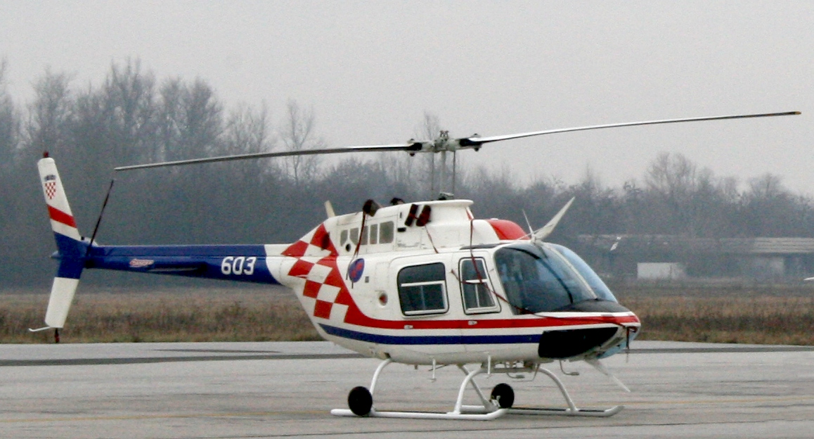 Bell 206, Zagreb